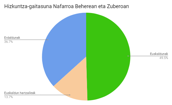 Nafarroa Beherea eta Zuberoako hizkuntza-gaitasuna, bi probintzietako datuak grafiko bakarrean txertatu dira. 2016ko ikerketa soziolinguistikotik atera dira datu hauek.